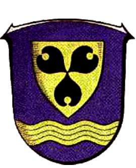 Wappen des Ortsteiles Seelbach der Stadt Herborn „Das Wappen von Seelbach, Stadtteil von Herborn, zeigt in blauem Feld über einem goldenen Wellenbalken im Schildfuß einen goldenen Schild mit drei schwarzen Seeblättern im Dreipaß.“ Heimat- und Geschichtsverein Herborn-Seelbach